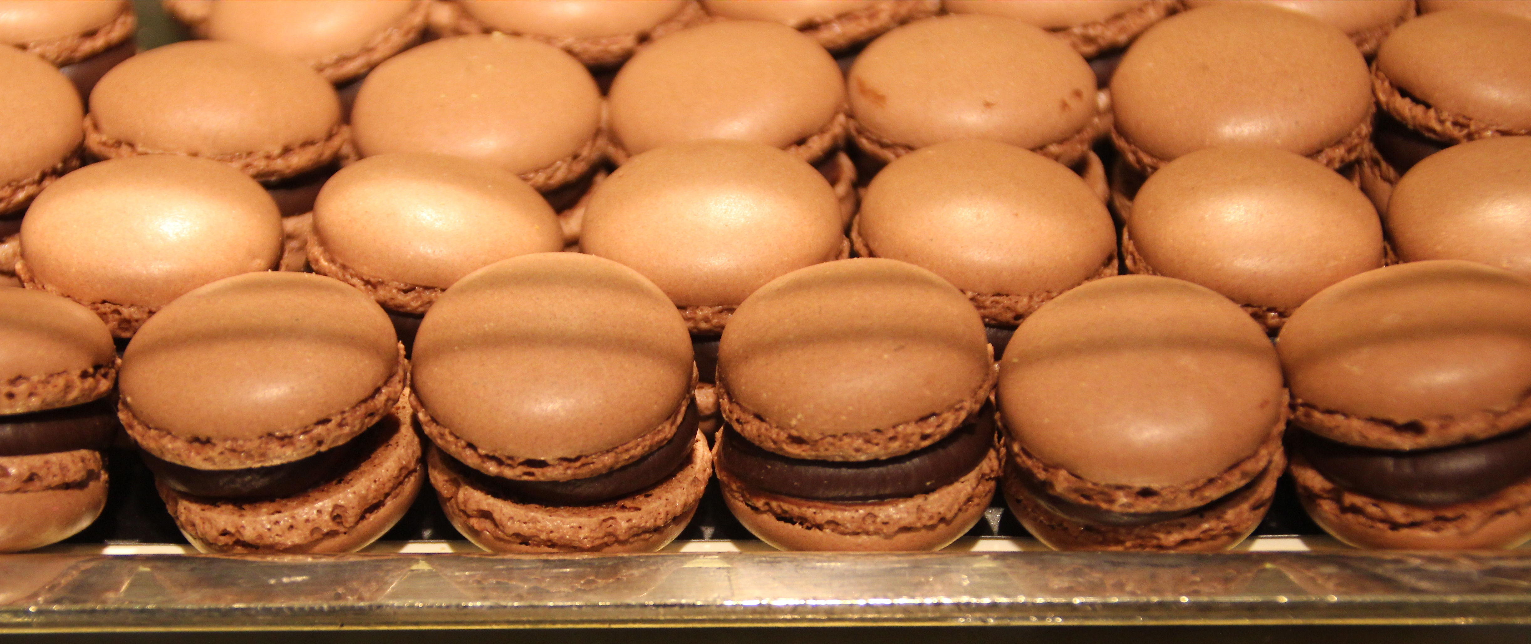 Schokolade-Luxemburgerli.